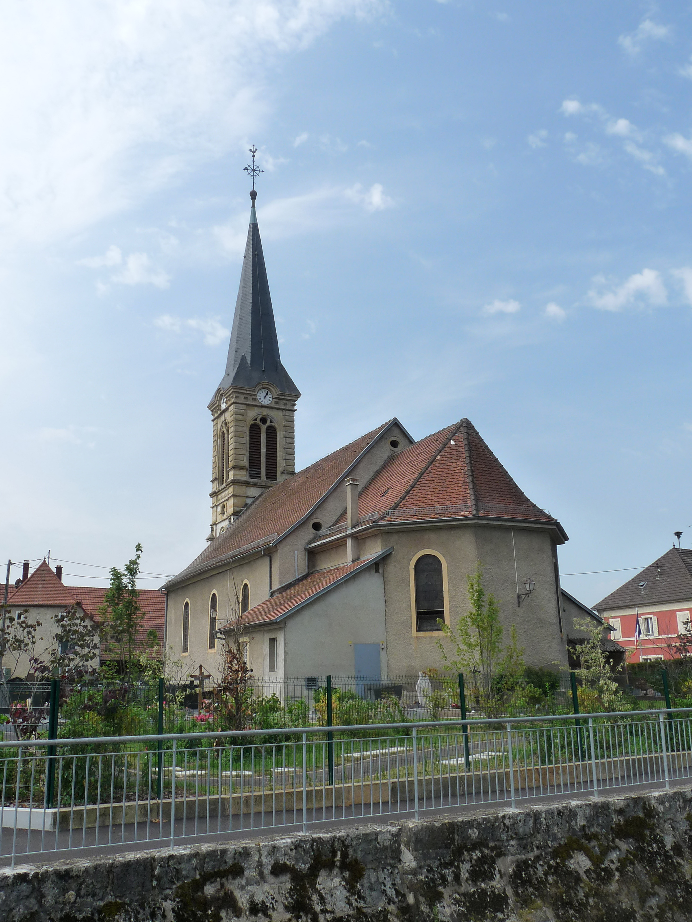 Fislis (Haut-Rhin) : Église Saint-Léger